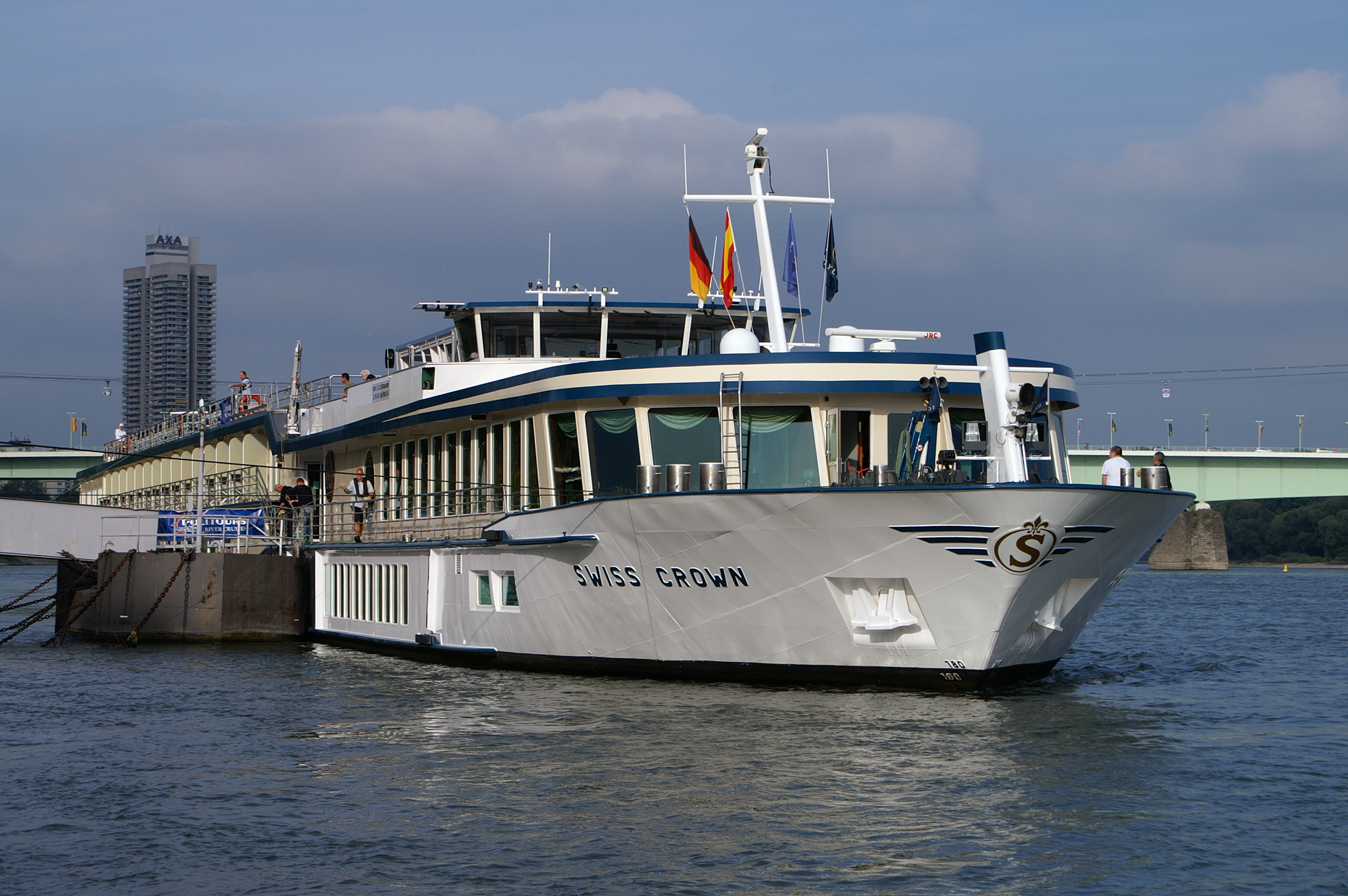 Flusskreuzfahrtschiff Swiss Crown in Köln.